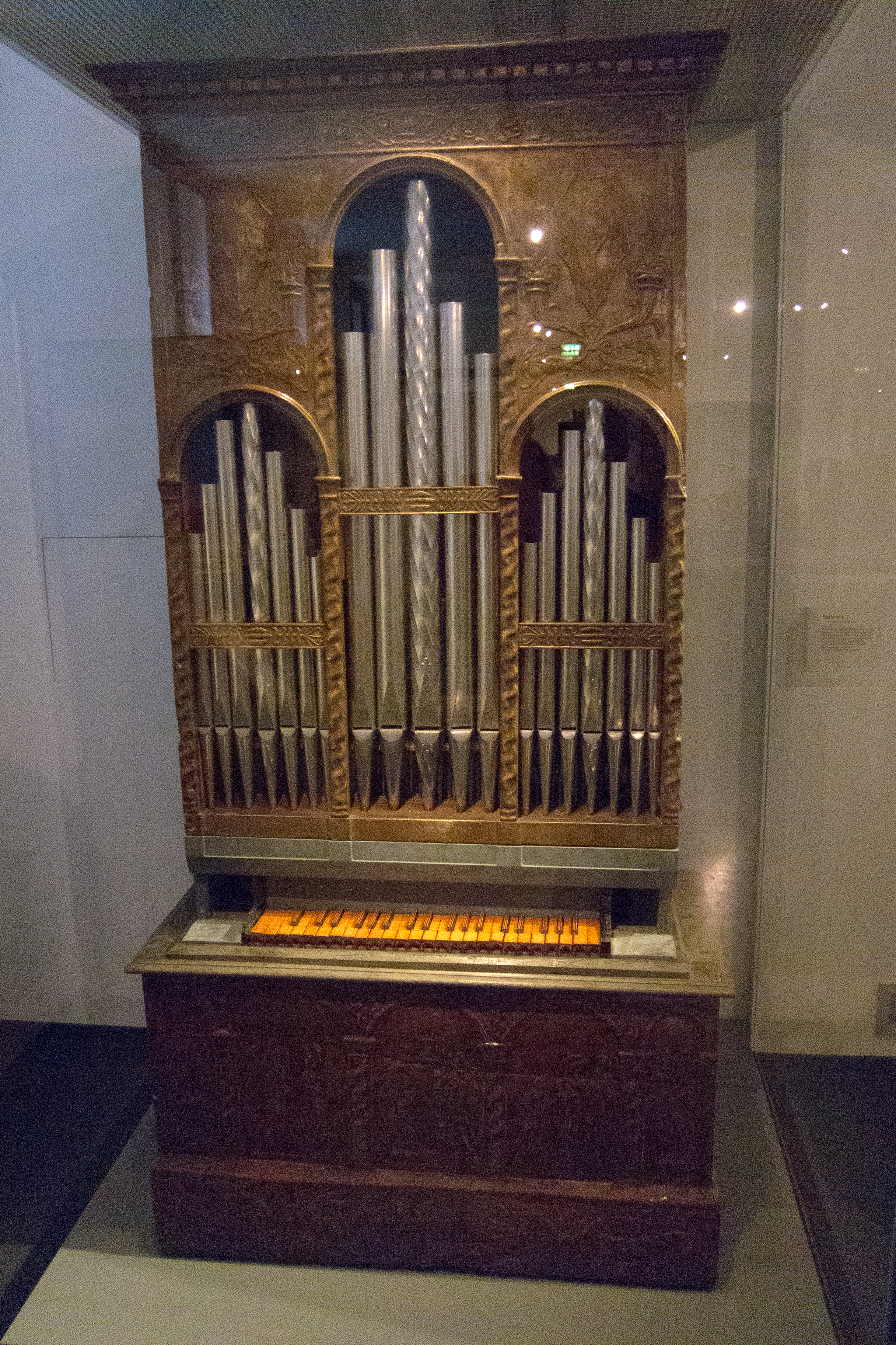 "Small organ, Leipzig 2012"